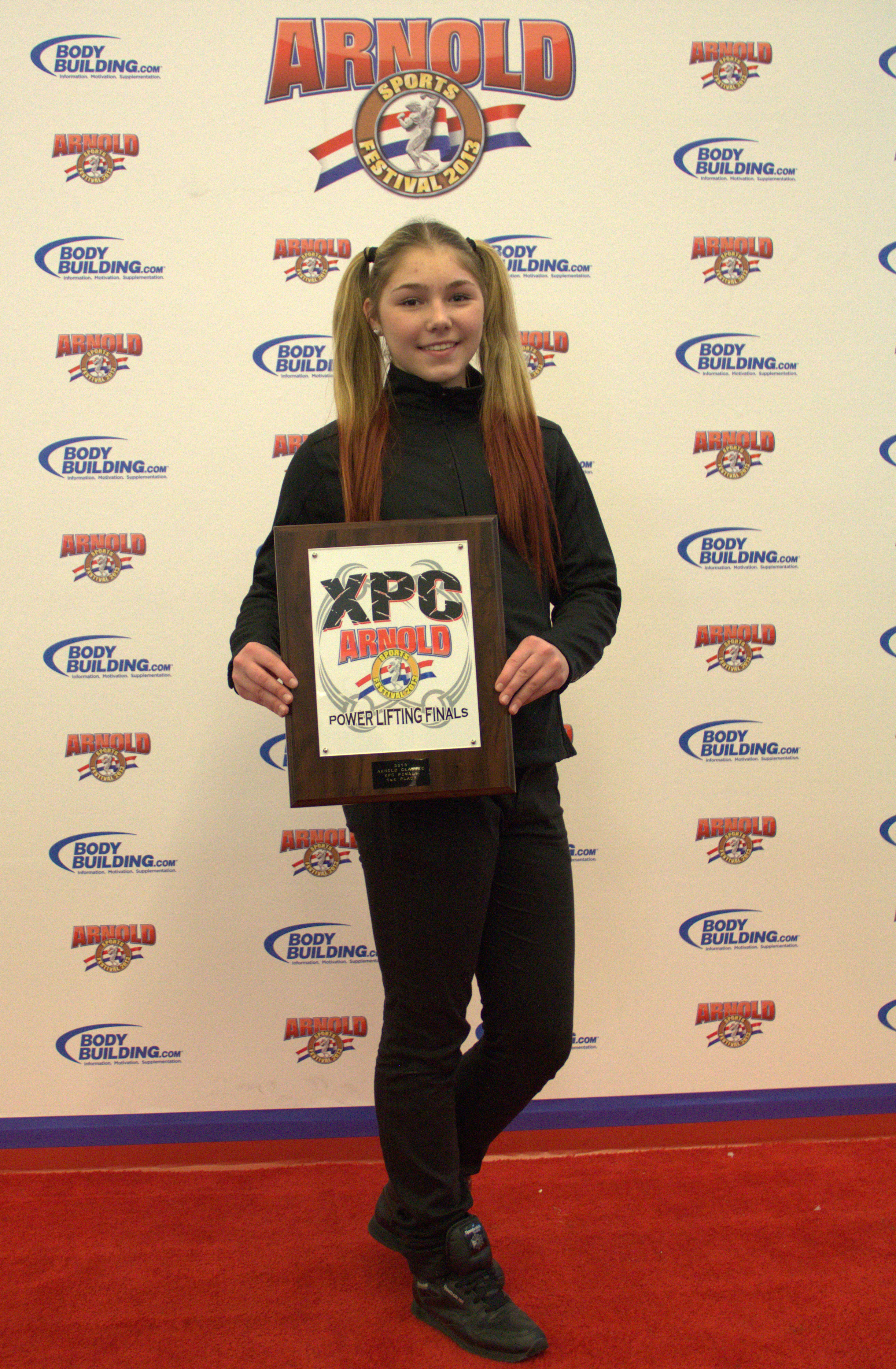 Марьяна Наумова, чемпионка Мира 2011-2012, Абсолютная рекордсменка Мира в жиме штанги лежа среди девушек-тинейджеров, первая девушка до 18 лет, выполнившая норматив Элита России в жиме штанги лежа и попавшая на обложку крупнейшего в Мире журнала по пауэрлифтингу "Powerlifting USA". На фото - награждение Марьяны на Арнольд Классик Спортс Фестивале, на турнире по жиму лежа федерации XPC. Марьяну Наумову с рекордом поздравил лично Арнольд Шварценеггер.